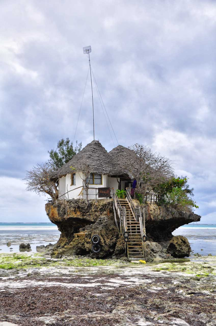 Zanzibar